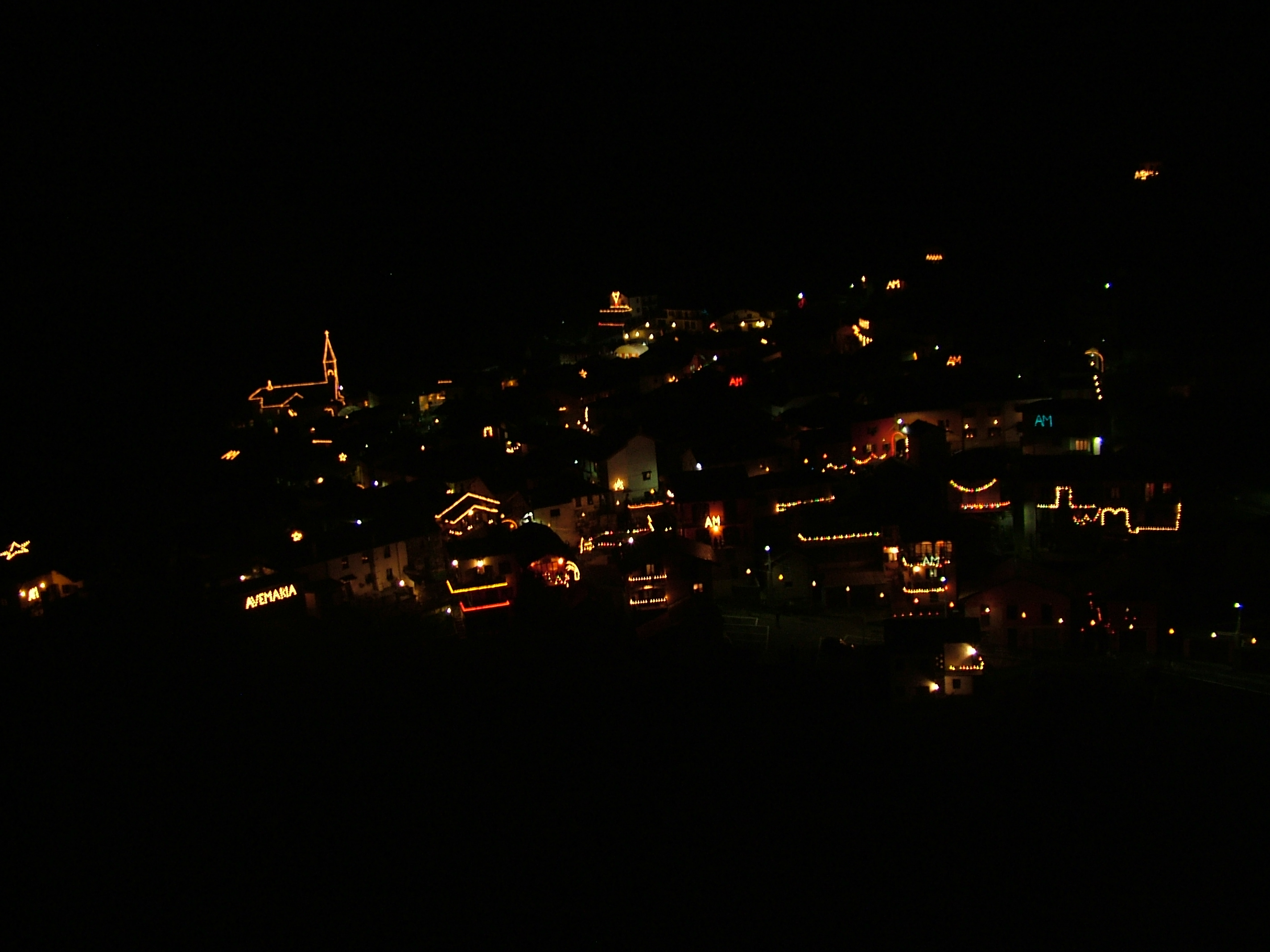 il paese interamente illuminato par la festa triennale della colletta